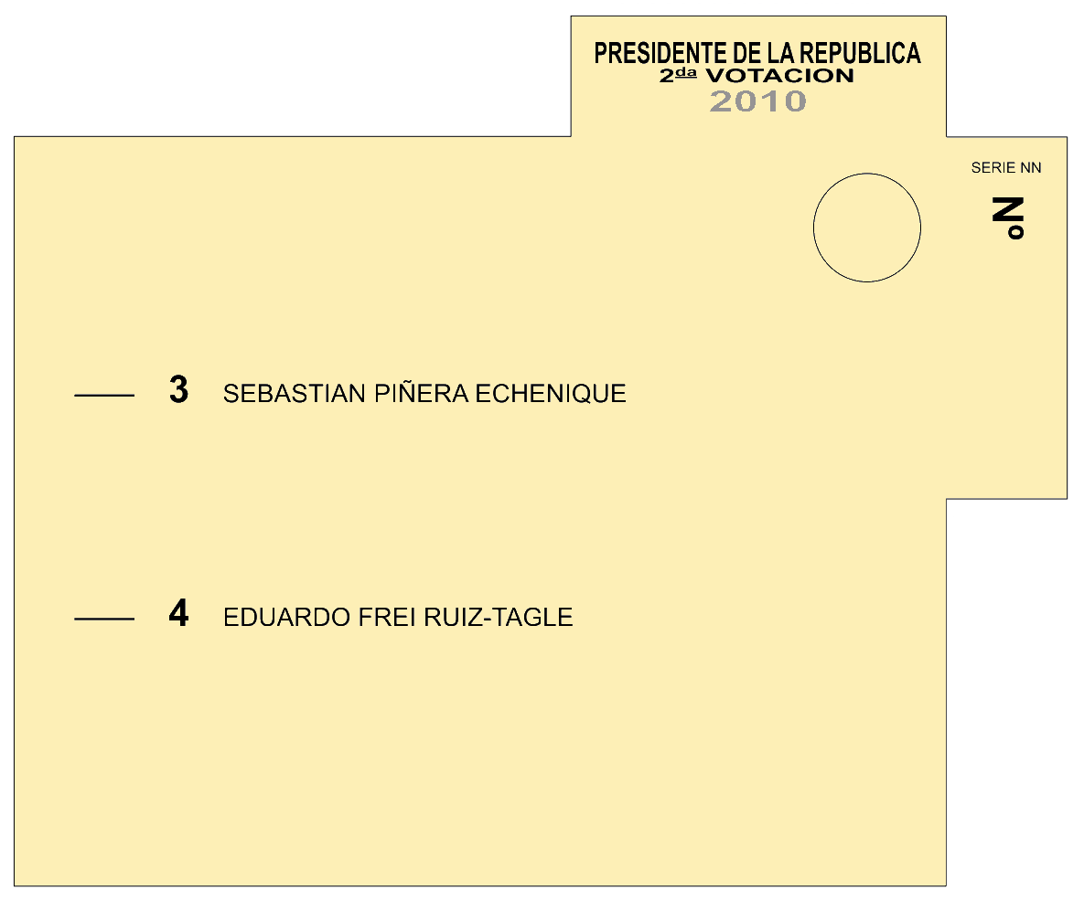 Reproducción facsimilar del voto utilizado en la segunda vuelta de la elección presidencial chilena de 2009, realizadas el 17 de enero de 2010.